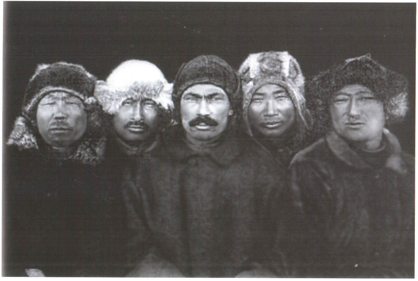 Проводники Э.В. Толля в экспедиции на о-в Беннетта: второй слева - эвен Николай Протодьяконов, по прозвищу Омук, крайний справа - якут Василий Горохов, по прозвищу Василий Чичак (зять Протодьяконова)